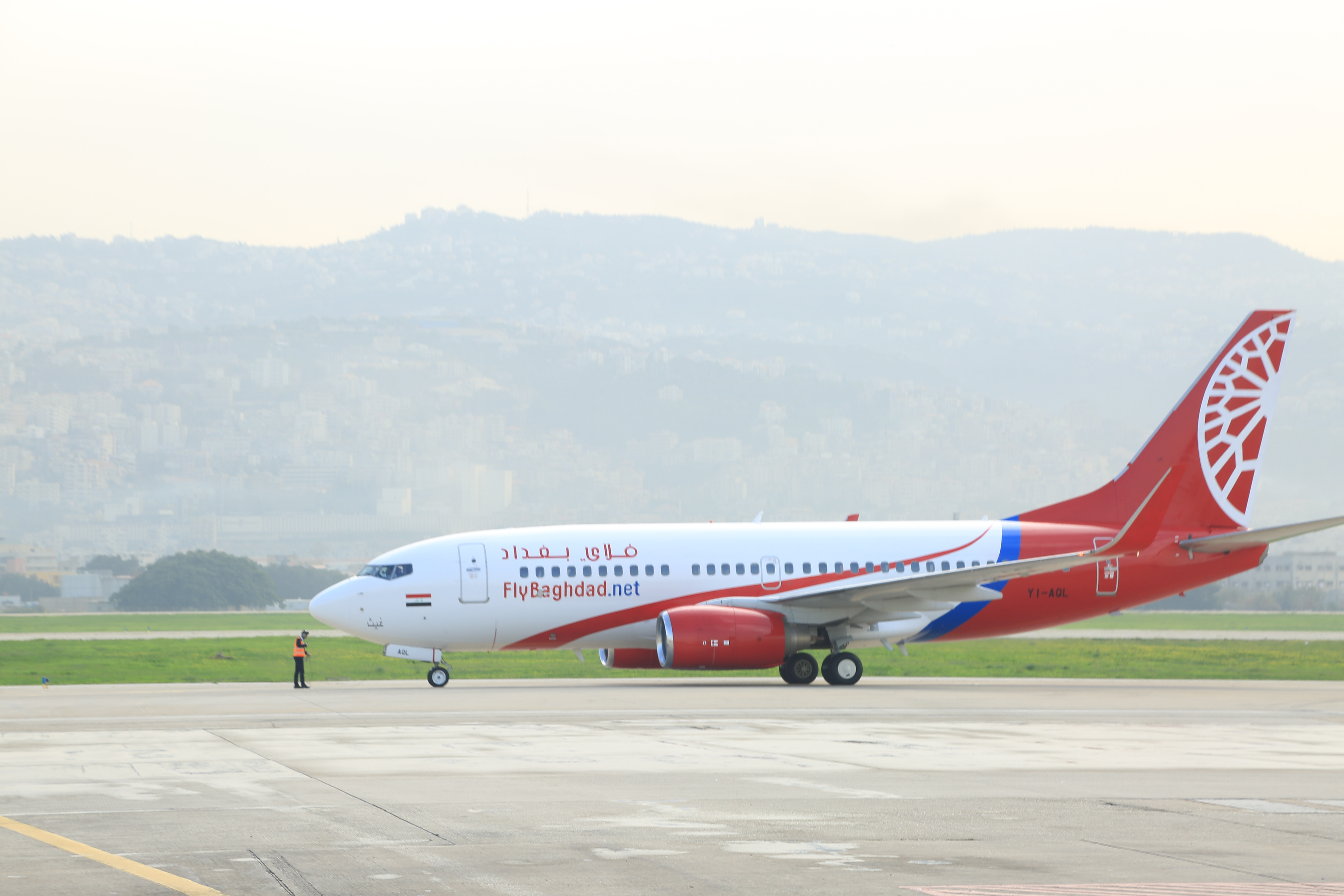 Boeing 737-700